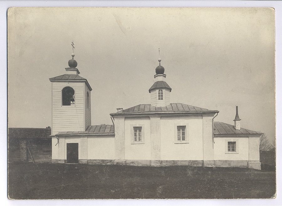 Беларуская (тарашкевіца): Полацак (Połacak), Бельчыца (Bielčyca). Манастыр Сьвятых Барыса і Глеба, царква Сьвятой Параскевы Пятніцы